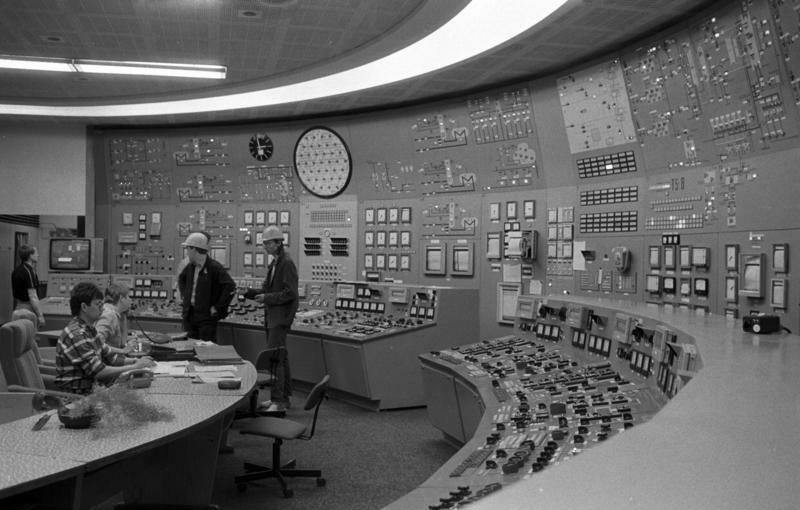 Greifswald, Störfall im Kernkraftwerk ADN-ZB/Franke 21.2.1990 Bez. Rostock: Störfall im KKW Greifswald In der Blockwarte 4 des KKW "Bruno Leuschner" wurde der am Vortag wegen eines bei Nachrüstarbeiten beschädigten Kabels abgeschaltete Reaktor wieder angefahren. Er wird am Donnerstag die normale Leistung erreichen. Der Zwischenfall fällt nicht in eine der sieben Kategorien der internationalen Störfallskala.